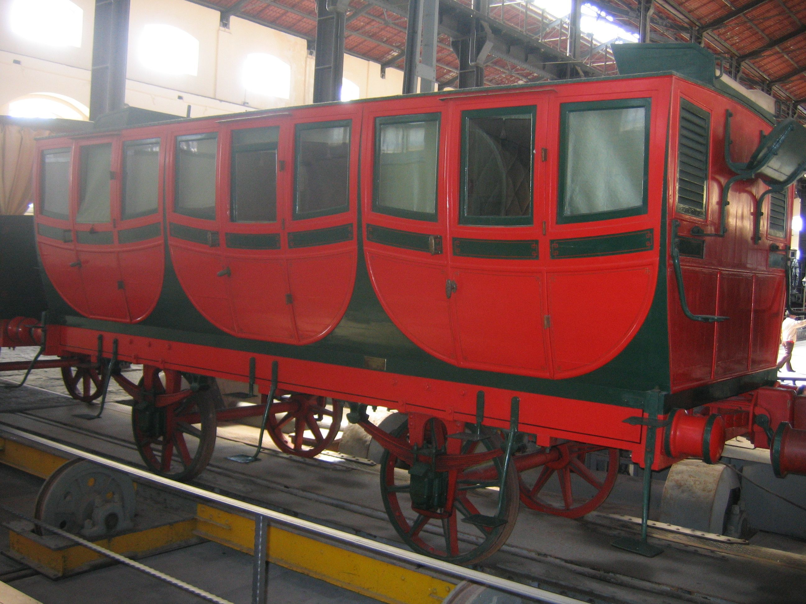 Wagen erster Klasse des ersten italienischen Zuges von 1839 (Nachbau).